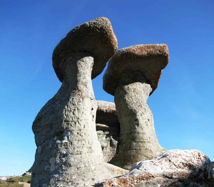 Un unghi inedit din care am surprins faimoasele formatiuni denumite"Babele" din M-tii Bucegi, la cc. 2200m altitudine, aflate in apropierea cabanei cu acelasi nume. Nu departe se afla "Sfinxul" si impreuna constituie atractia turistica de pe platoul Bucegilor, vizitate de mii de turisti.